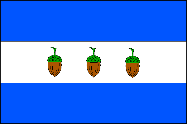 vlajka, Hrabětice, okres Znojmo